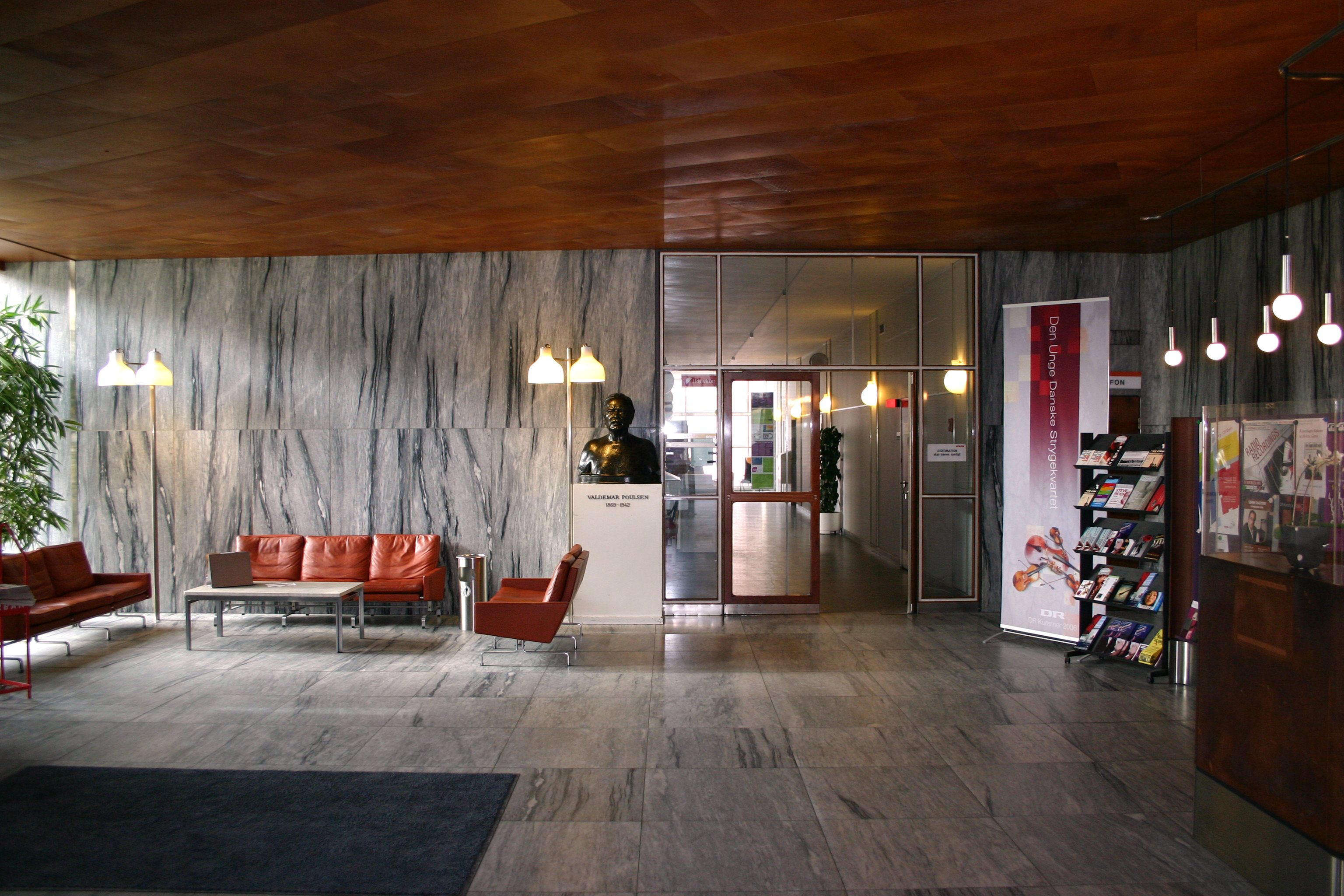 Radiohusets forhal, med kig ned mod Ny Fløj. Bag fotografen er receptionen til højre og indgangen med de to svingdøre til venstre.